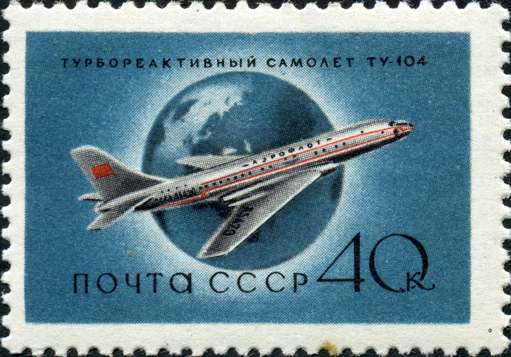 Марка СССР